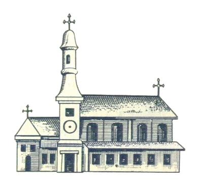 Беларуская (тарашкевіца): Друя (Druja), вуліца Сапежынская (vulica Sapiežynskaja). Касьцёл Найсьвяцейшай Тройцы і кляштар бэрнардынаў